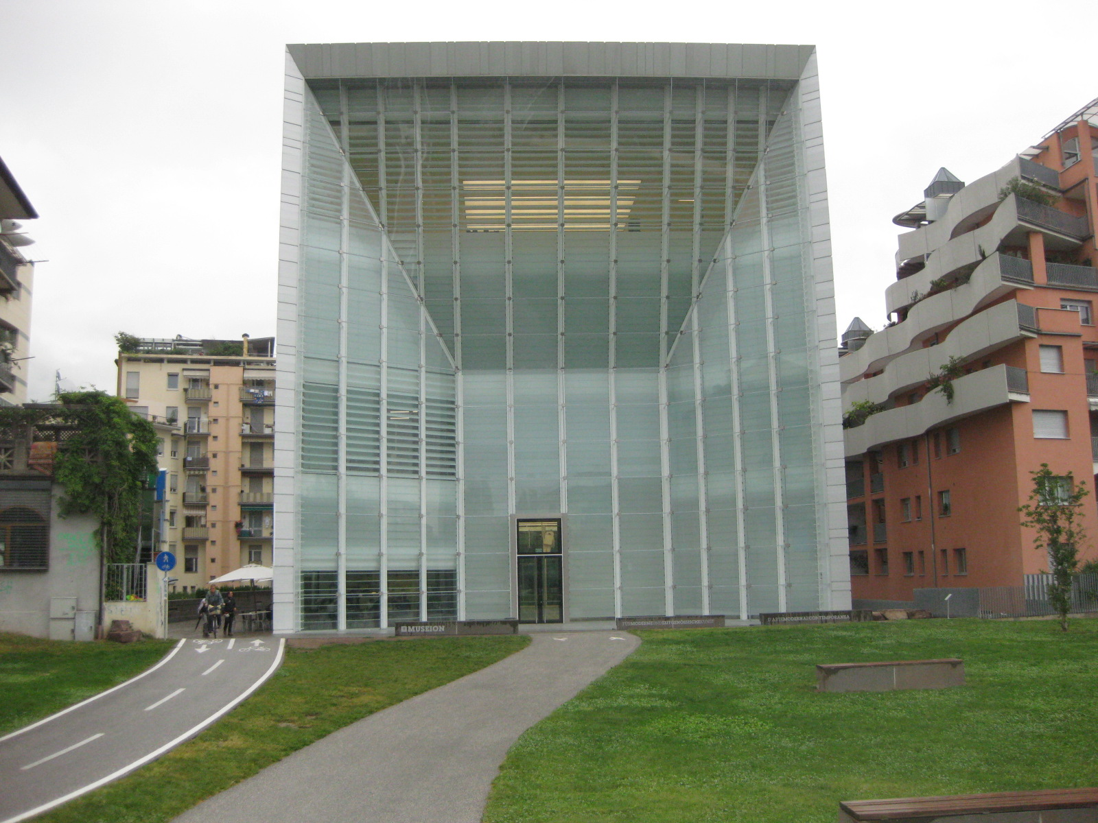 Das Museion (Bozen), Blick von der Talfer